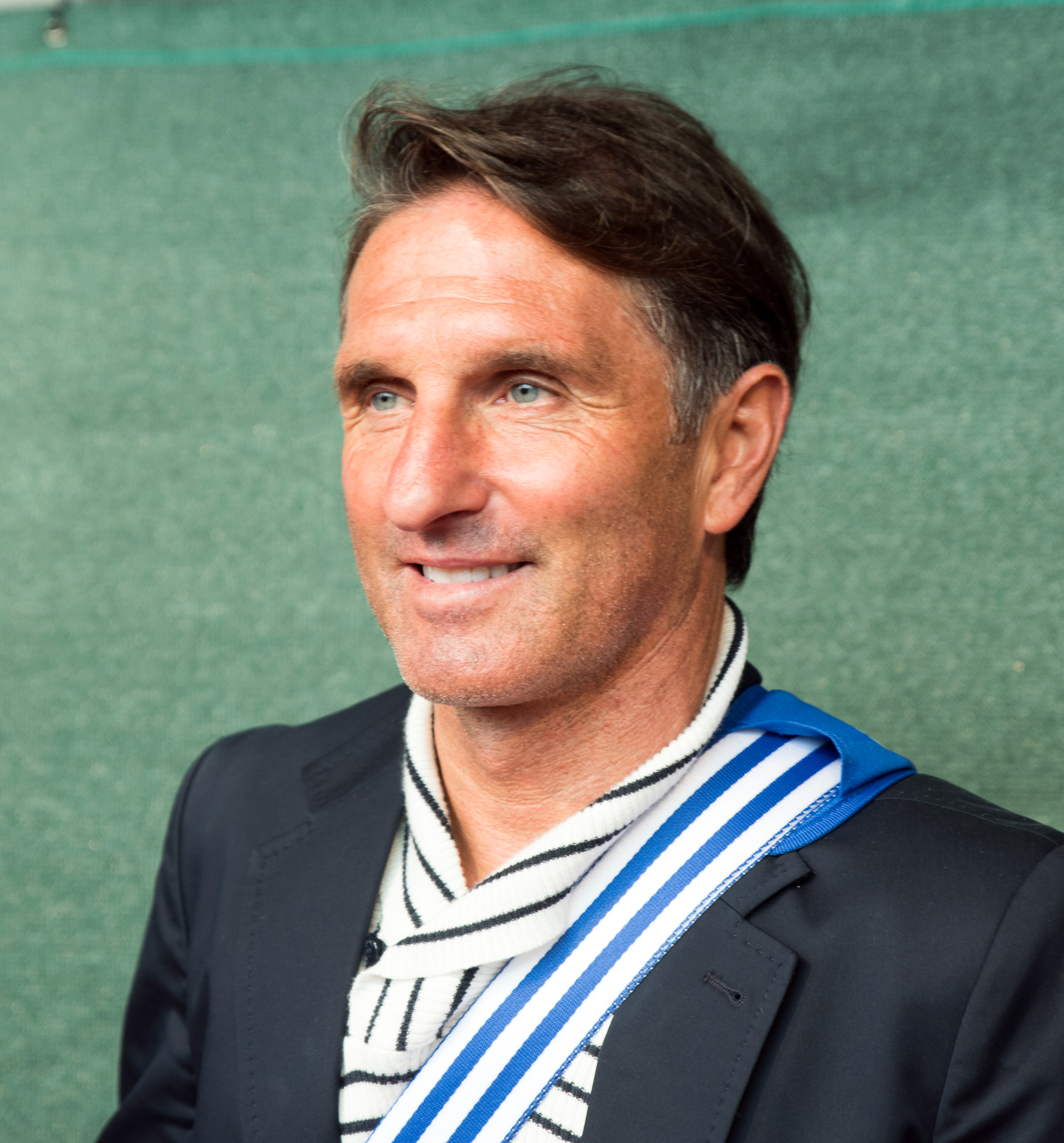 Bruno Labbadia beim Tag der Legenden 2016